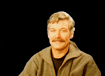 Portrait de François Cante-Pacos.